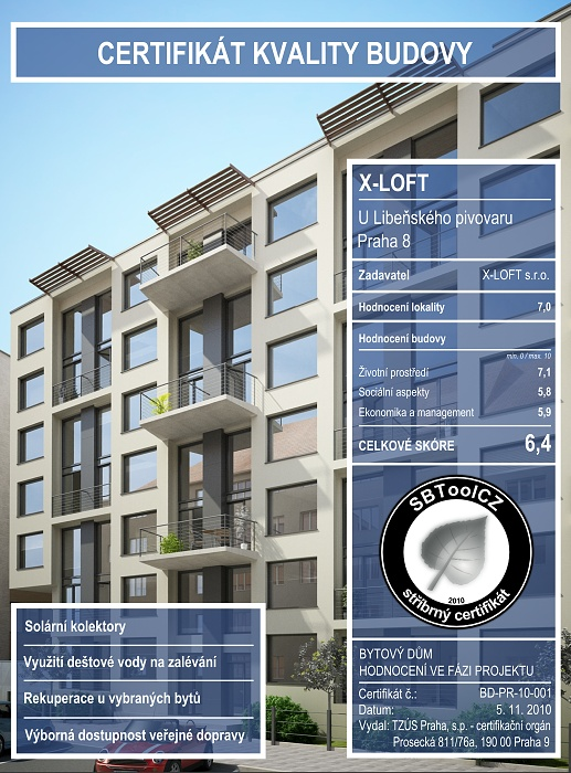 Certifikát komplexní kvality budovy (X-LOFT)